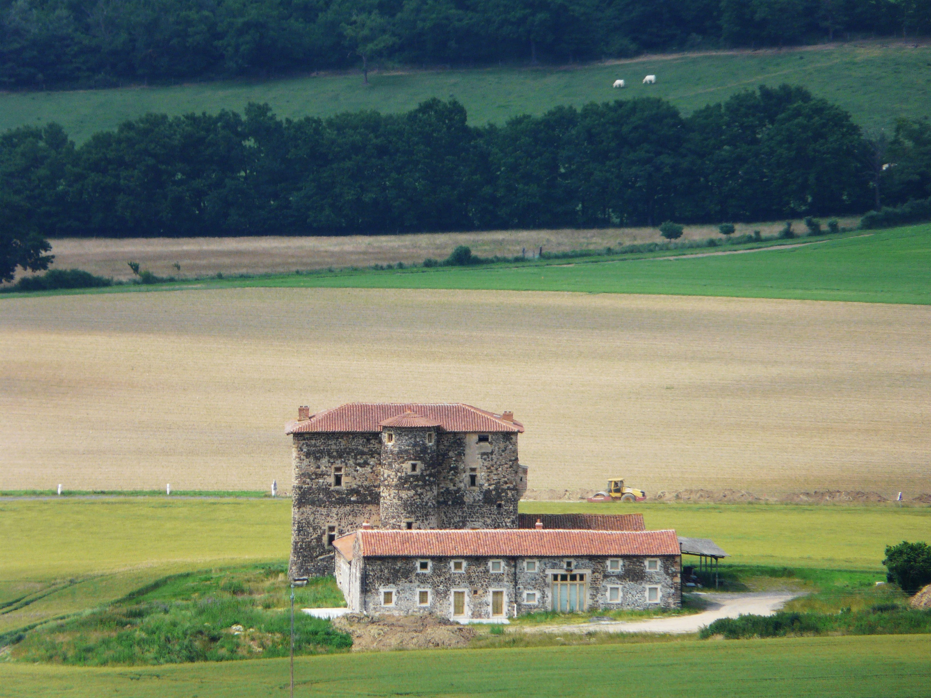 Le château de la Fouilhouze, Varennes-sur-Usson, Puy-de-Dôme, France.